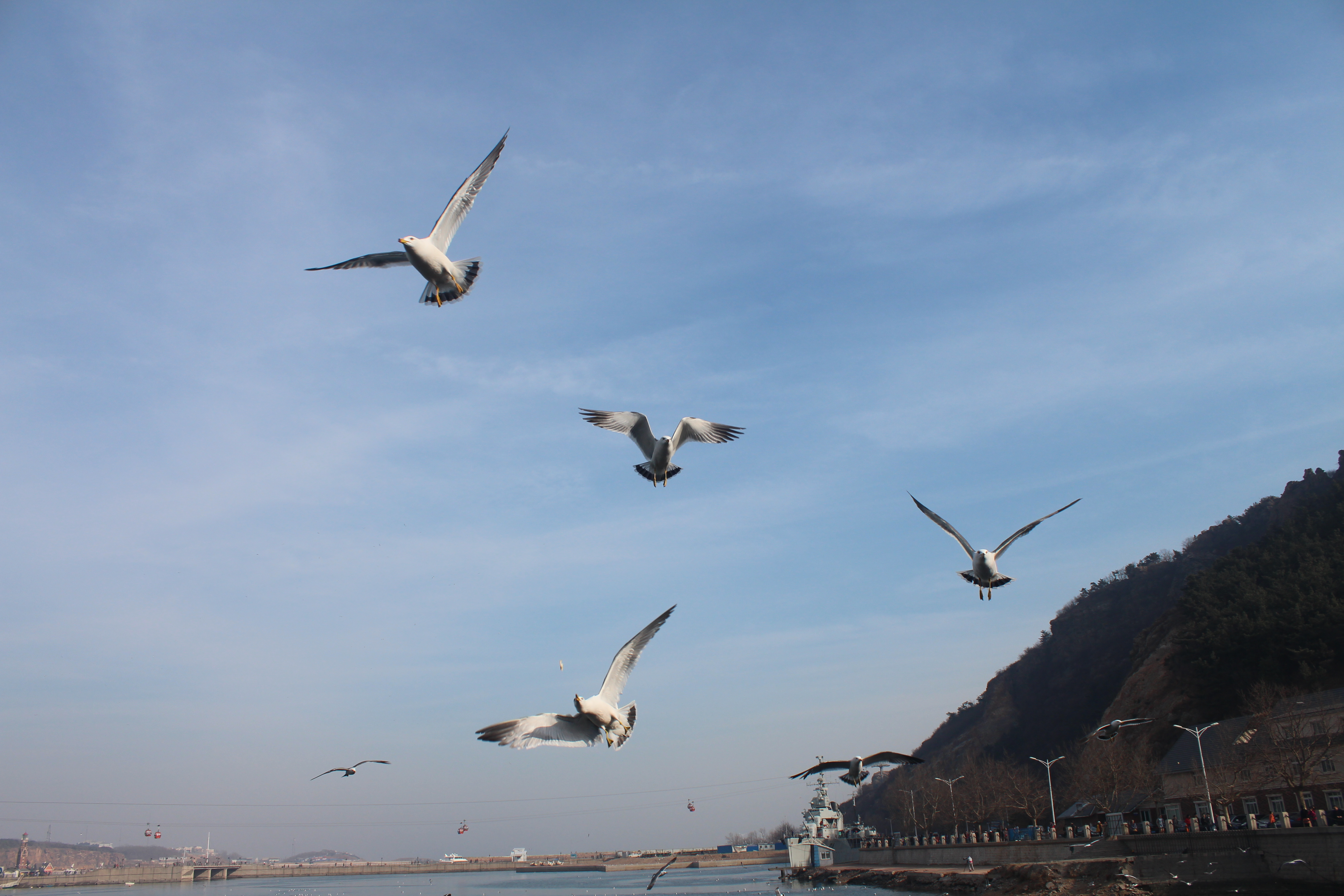 中文（中国大陆）: 老虎滩 海鸥